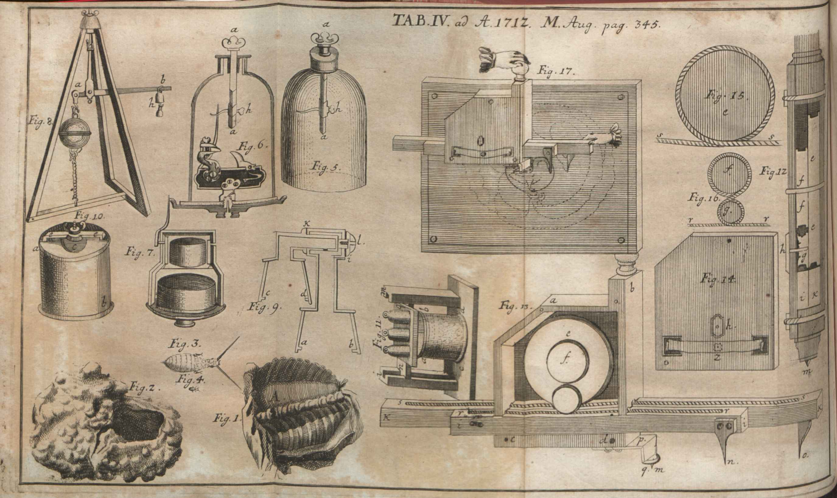 Illustration